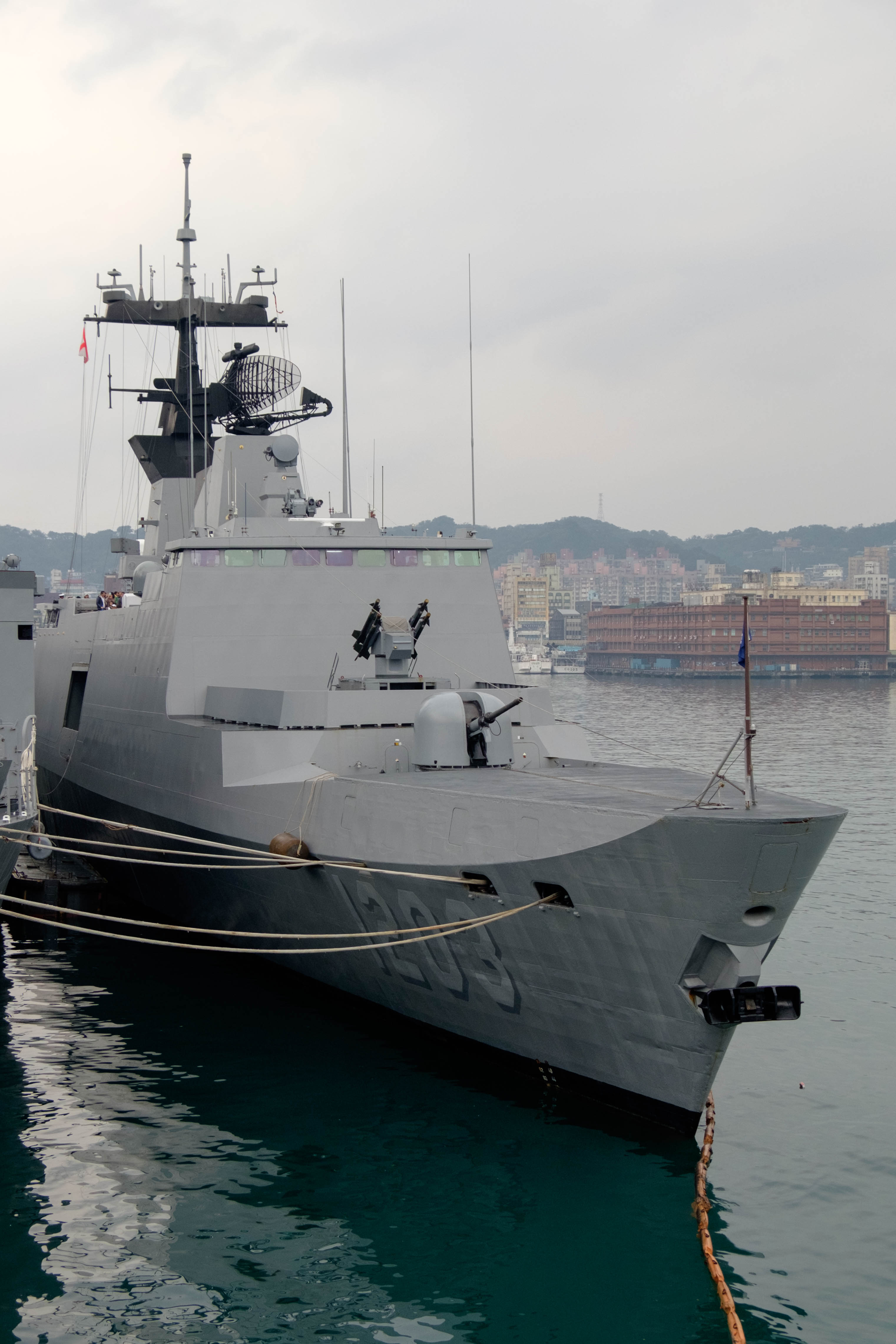 海軍106年敦睦遠航訓練支隊訪問基隆，從油彈補給艦磐石（AOE-532）艦尾直升機甲板俯望飛彈巡防艦西寧（PFG-1203）艦艏。